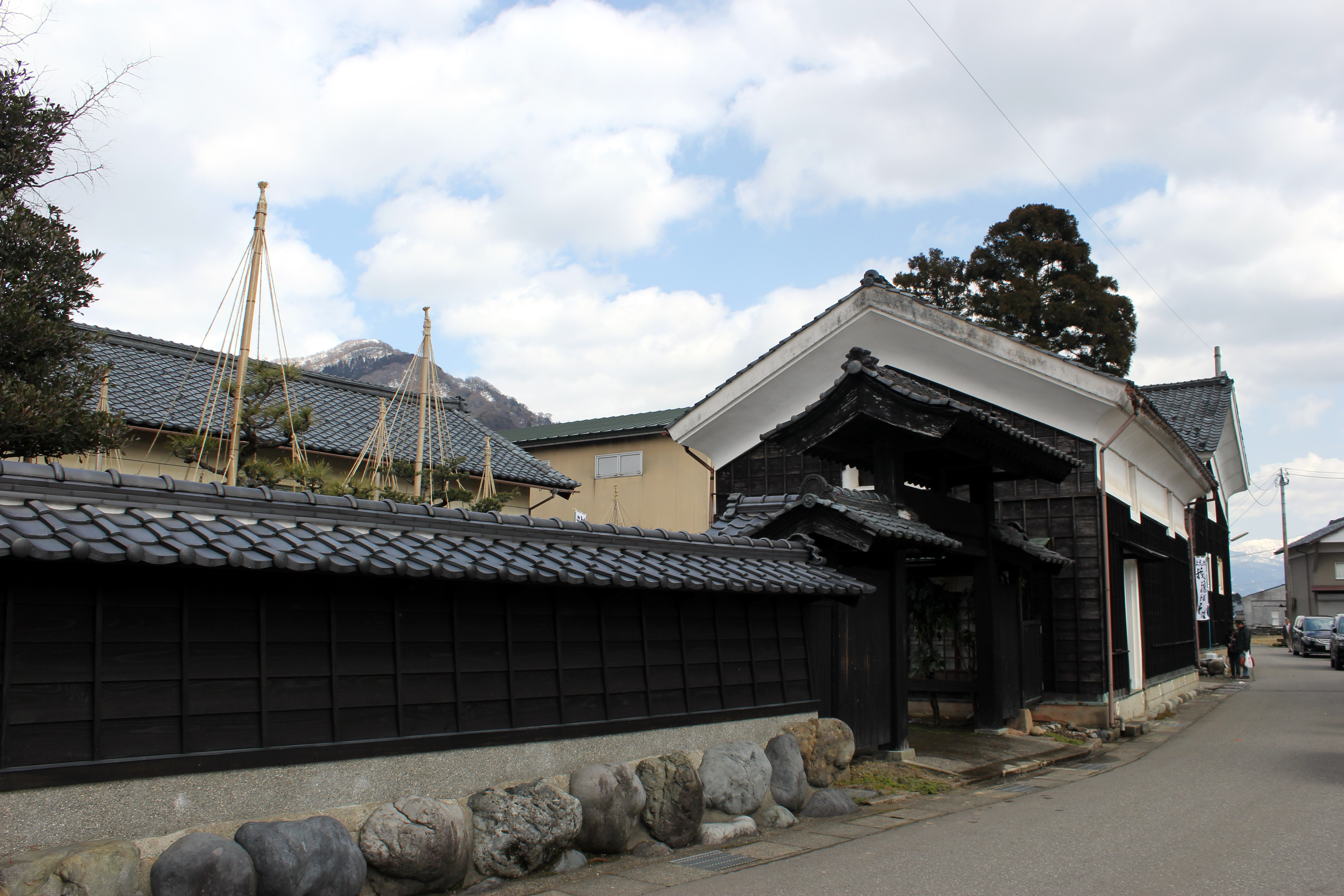 吉田酒造（福井）